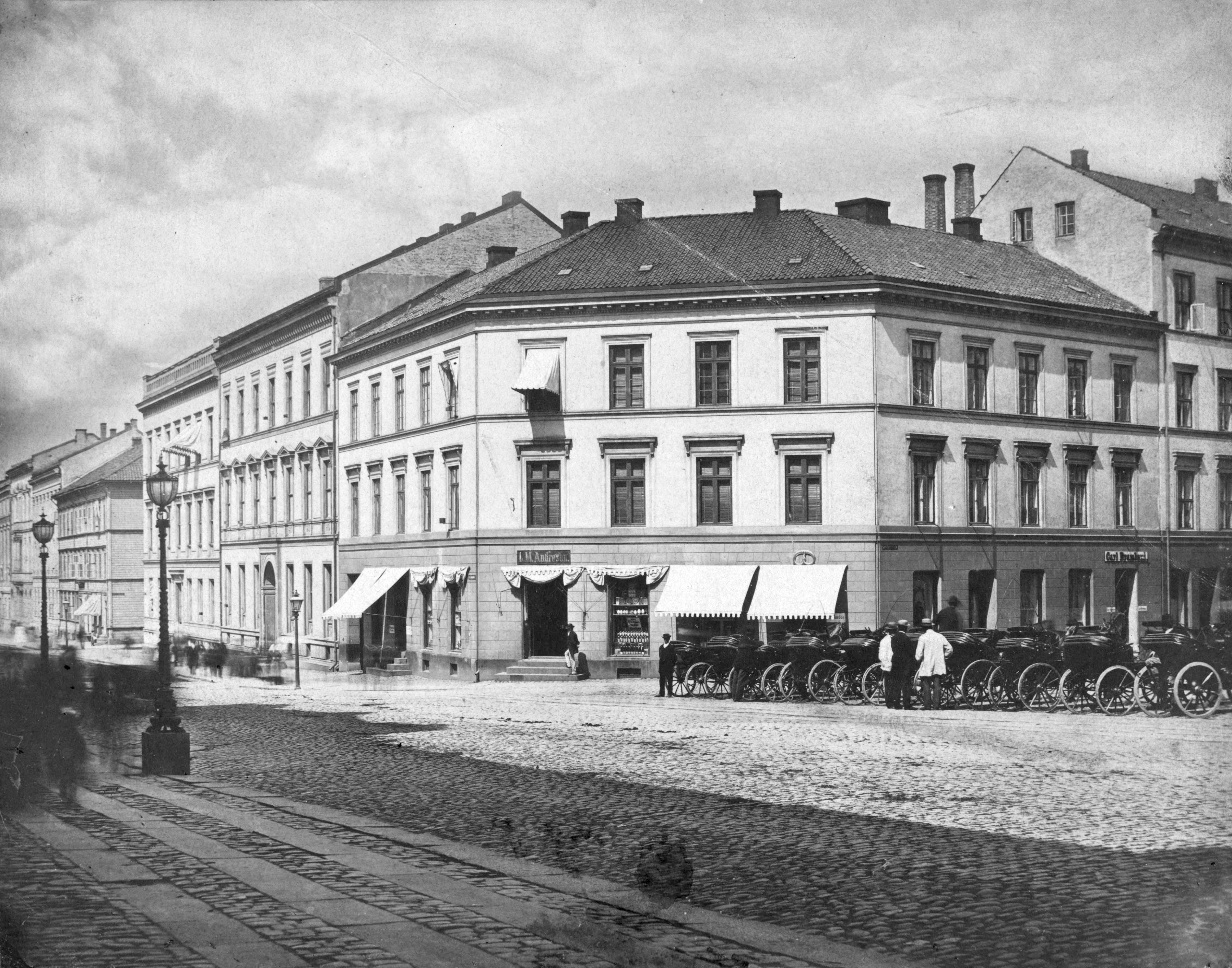 Bildet er hentet fra Nasjonalbibliotekets bildesamling. Anmerkninger til bildet var: Tittel hentet fra påskrift på komponentnr 1 Karl Johans gate, Oslo, Oslo